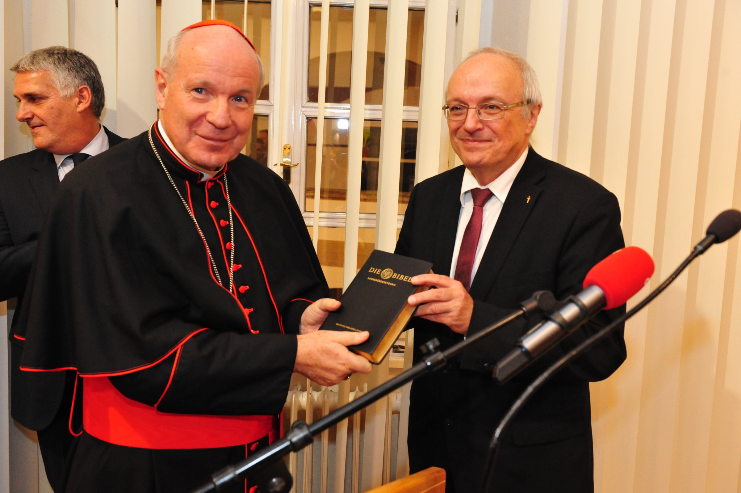 Kardinal Christoph Schönborn und Bischof Michael Bünker mit der neuen Lutherbibel.